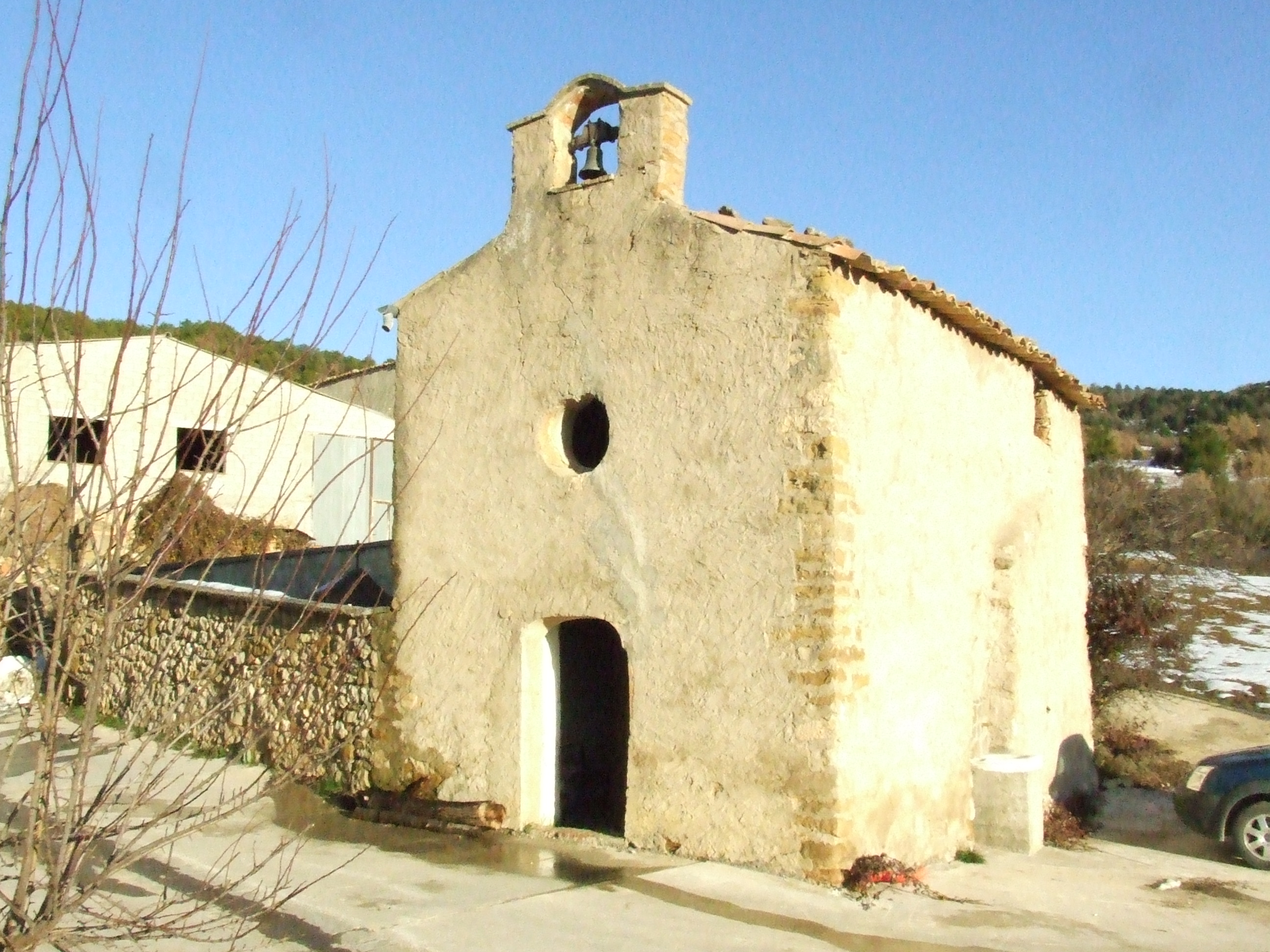 L'església de Sant Roc de Mata-solana (Sant Salvador de Toló, Gavet de la Conca, Pallars Jussà)